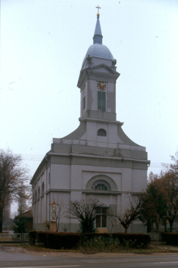 Saint Rozalia (Szent Rozália) church in Temerin